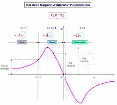 Makina asinkronoaren funtzionamendu moduak